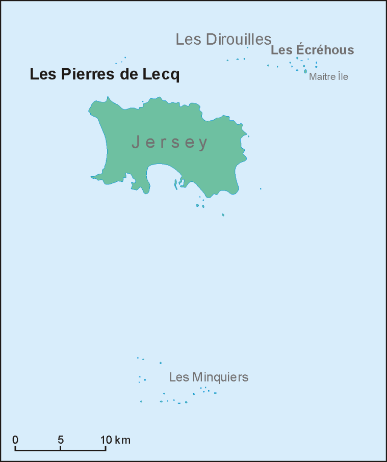 Location map of Les Pierres de Lecq